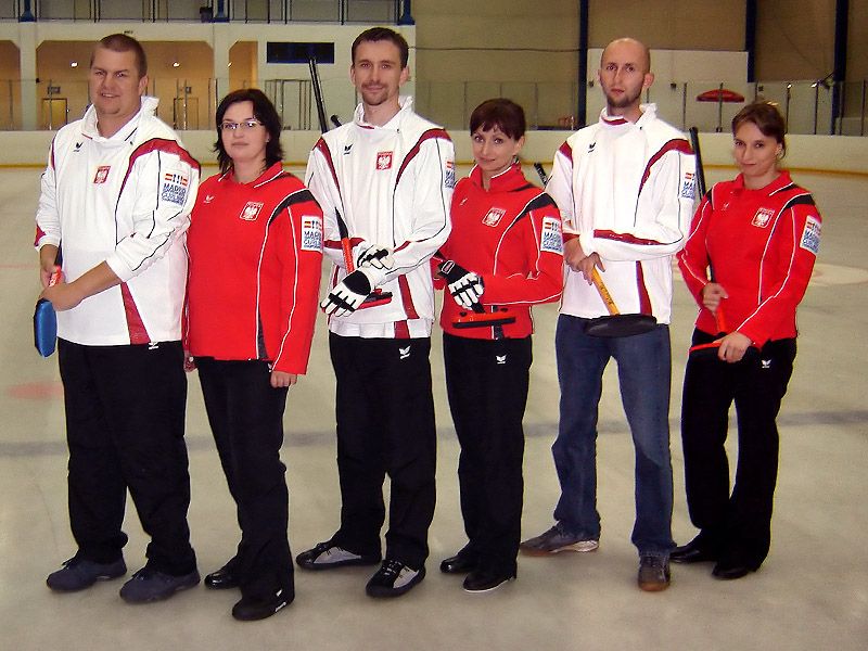 Reprezentacja Polski na Mistrzostwa Europy Mikstów w Curlingu 2007; od lewej: Rafał Janowski (skip), Małgorzata Janowska (wiceskip), Wojciech Ratajczak (drugi), Katarzyna Woźniak-Ratajczak (otwierająca), Tomasz Wołkow (rezerwowy), Krystyna Beniger (rezerwowa)